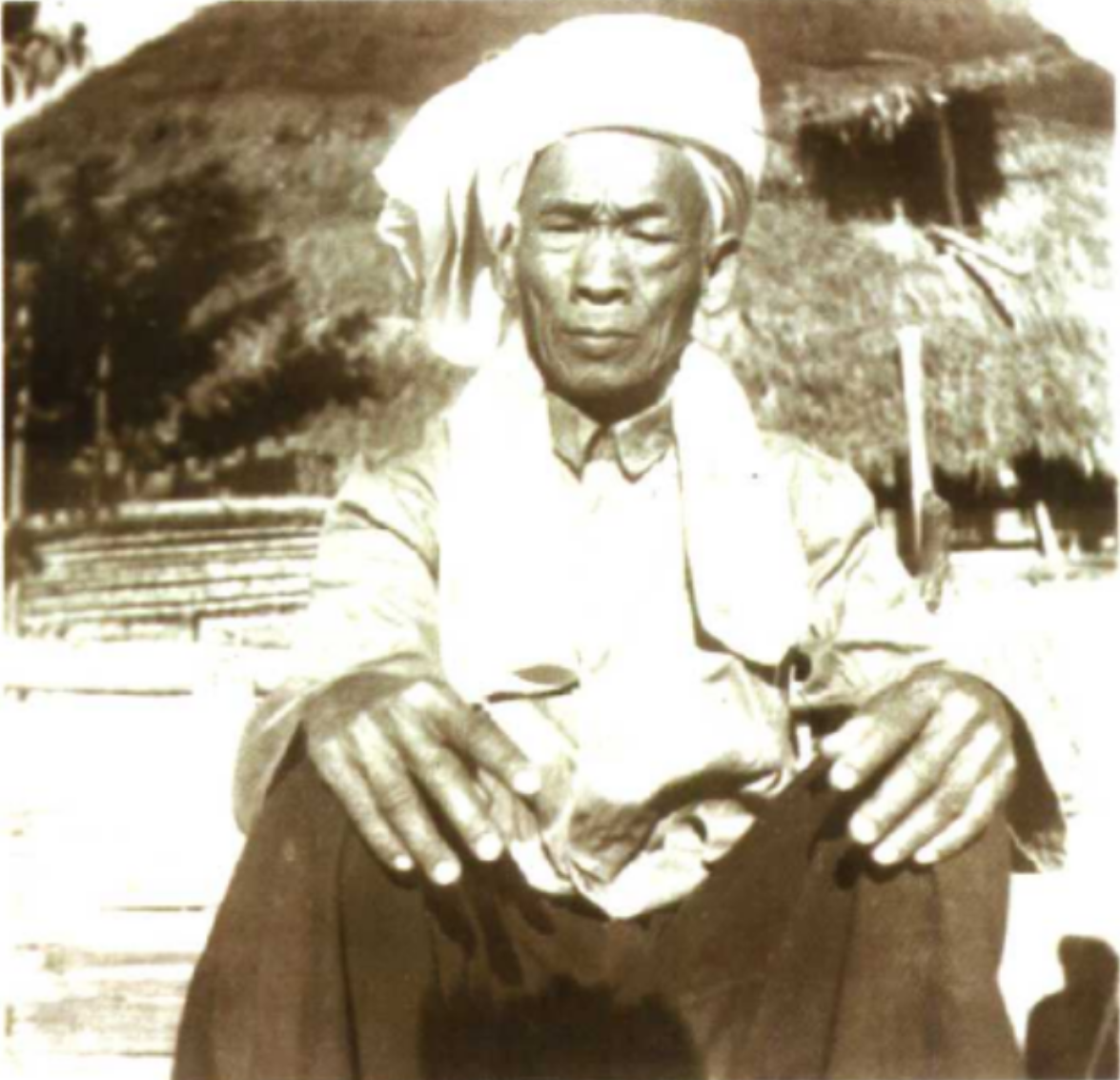 班洪抗英老战士白达拽